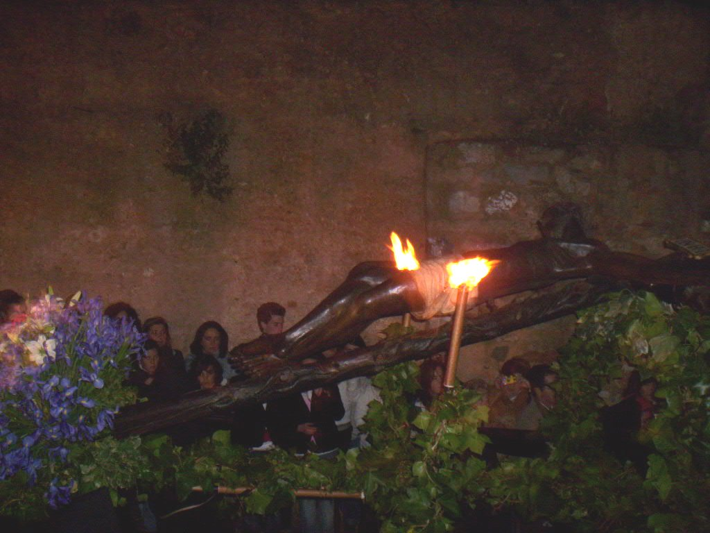 Paso del Cristo Negro en la Procesión del Cristo Negro en la Semana Santa 2007